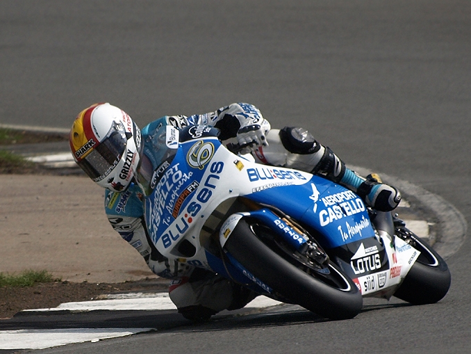 Alex Debon, Aeropuerto-Castello-Blusens 250cc